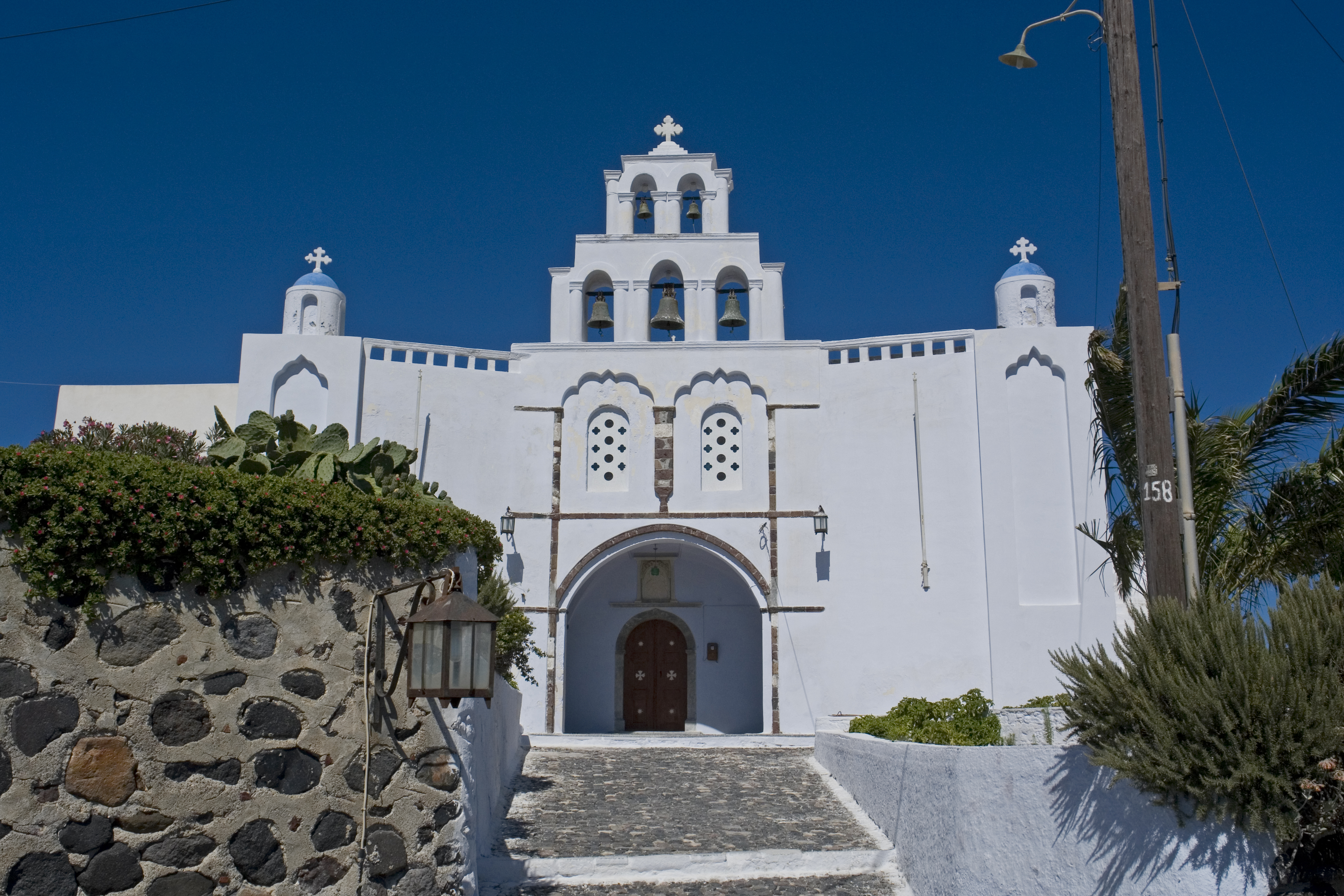 Santorin, Pyrgos, Kastellirche